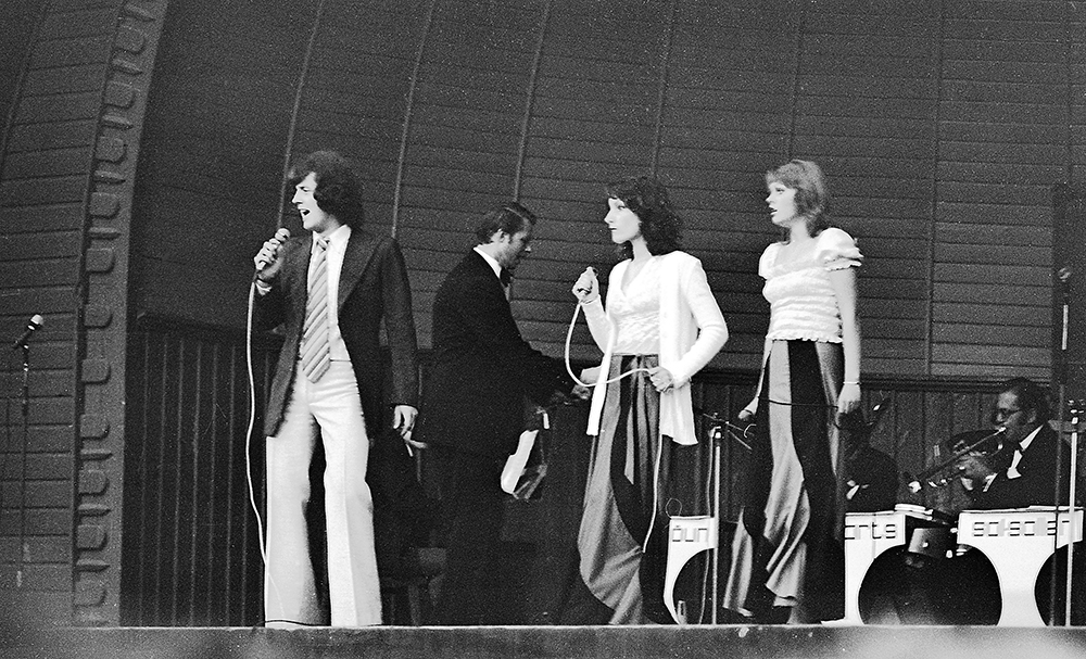 Jaak Joala Kadrioru kõlakojas 74